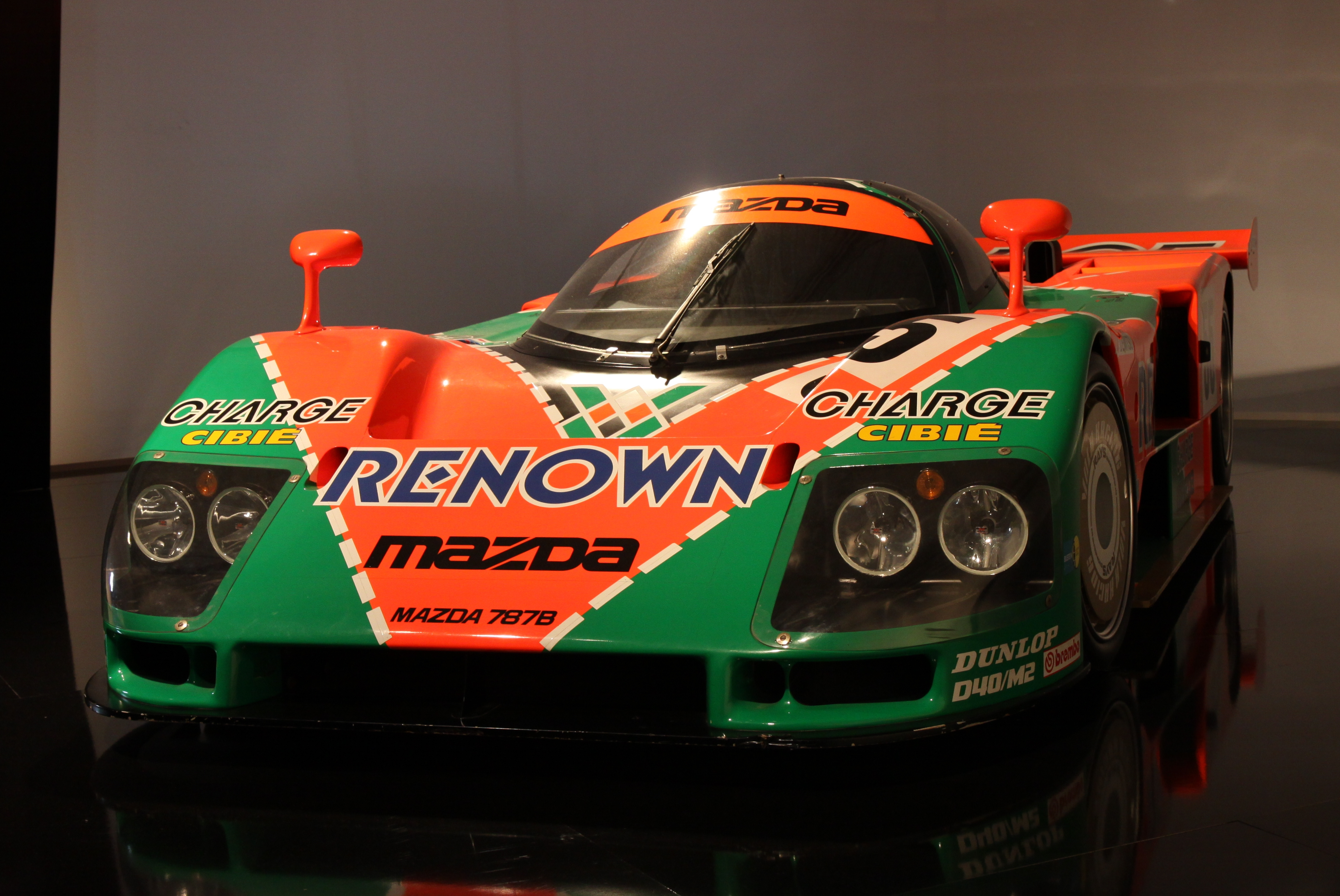 Paris - Mondial de l'automobile 2010